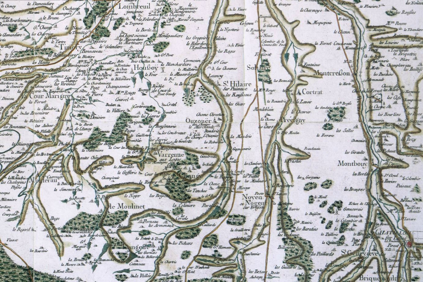 Carte de Cassini de la région de Pressigny-les-Pins (Précigny), Loiret, France